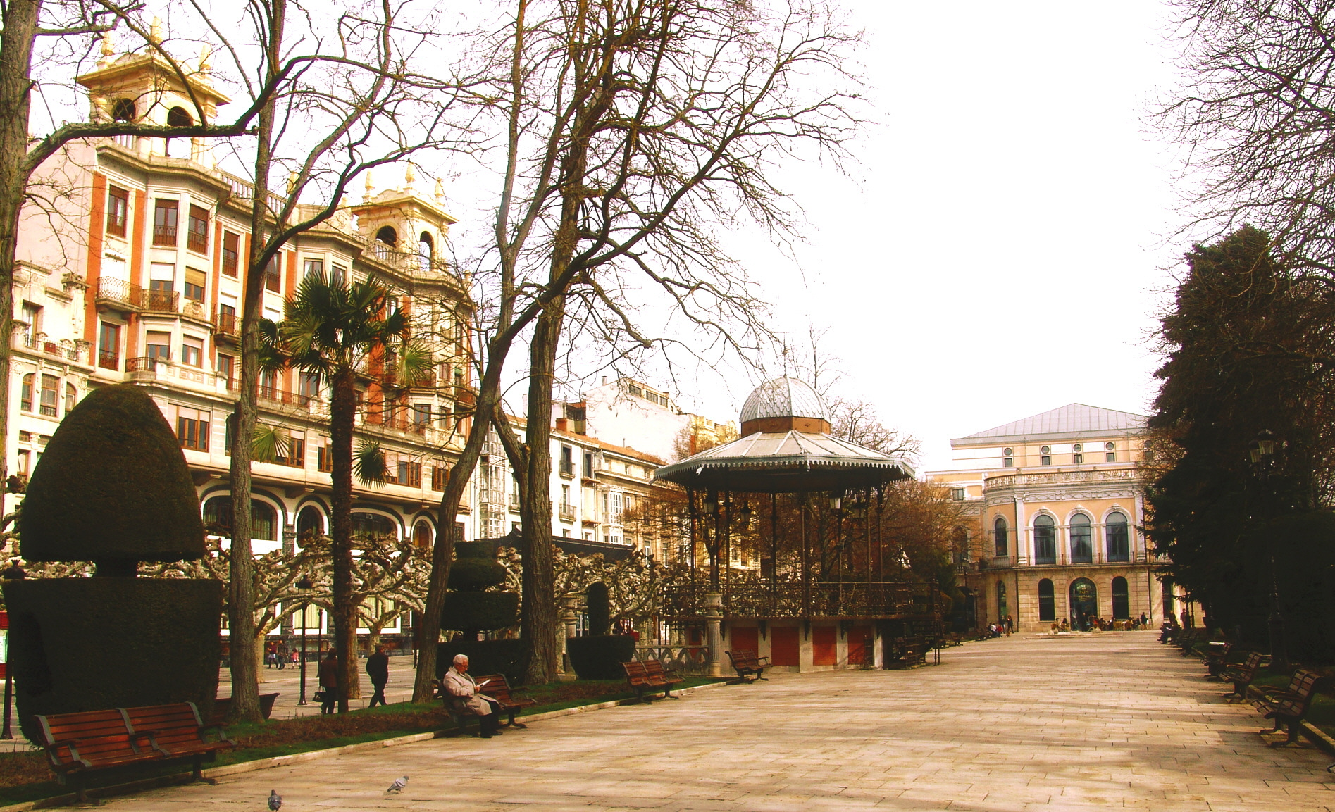 Burgos, España, Paseo del Espolón, vista desde los cuatro reyes hacia el Teatro Principal.